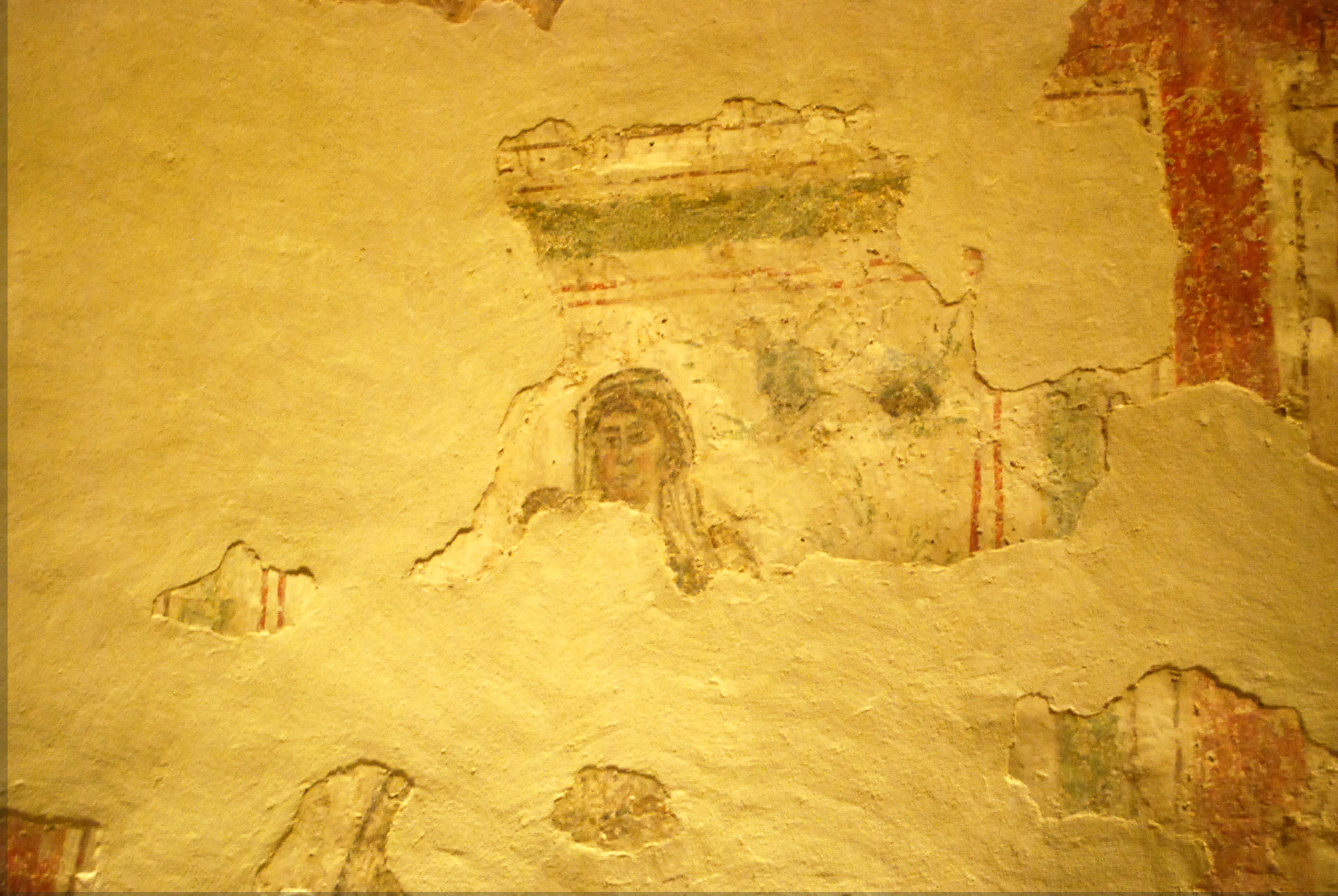 Szűz Mária ábrázolása az egyik pécsi ókeresztény sírkamrában (4. század)